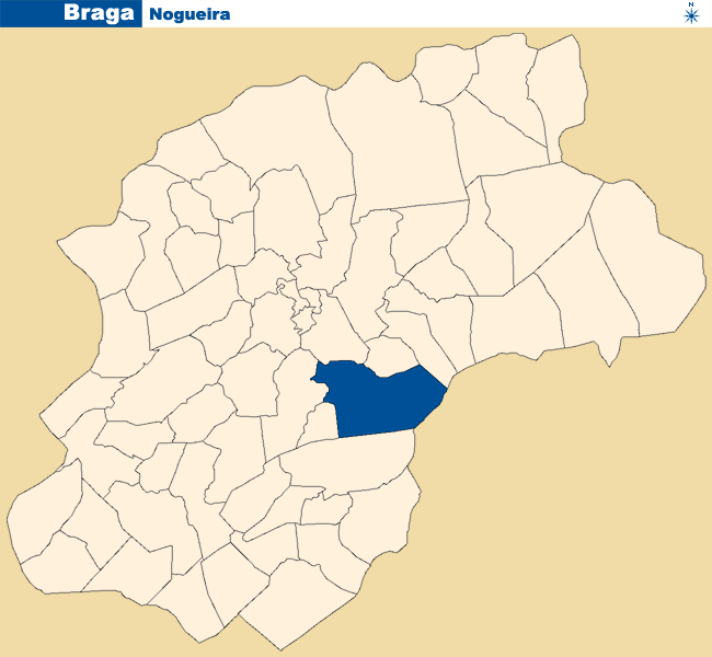 Localização de Nogueira no concelho de Braga.